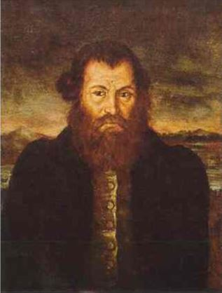 Мирон Ефимович Черепанов